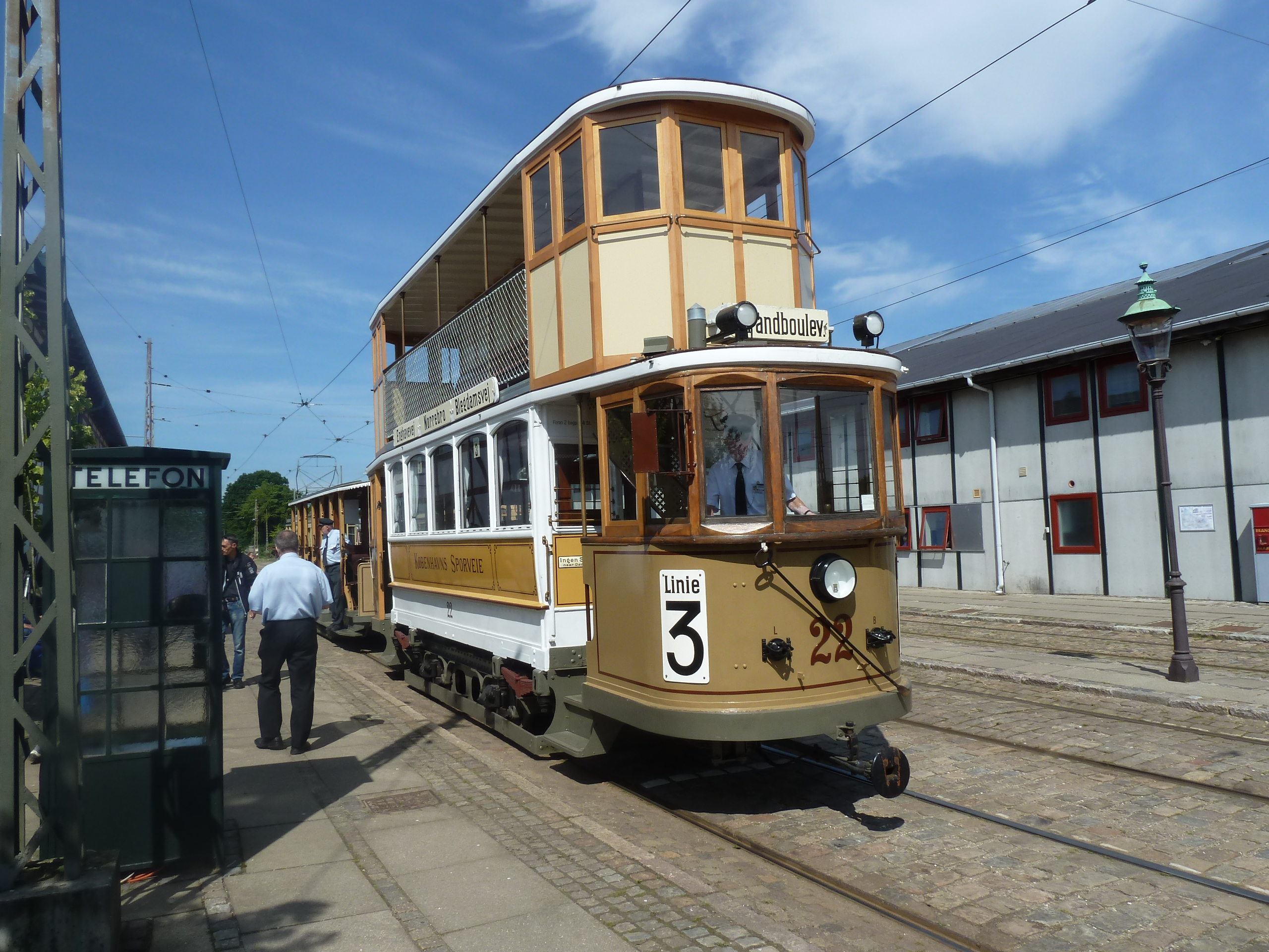 Old tram from Copenhagen, KS 22, on Sporvejsmuseet Skjoldenæsholm.